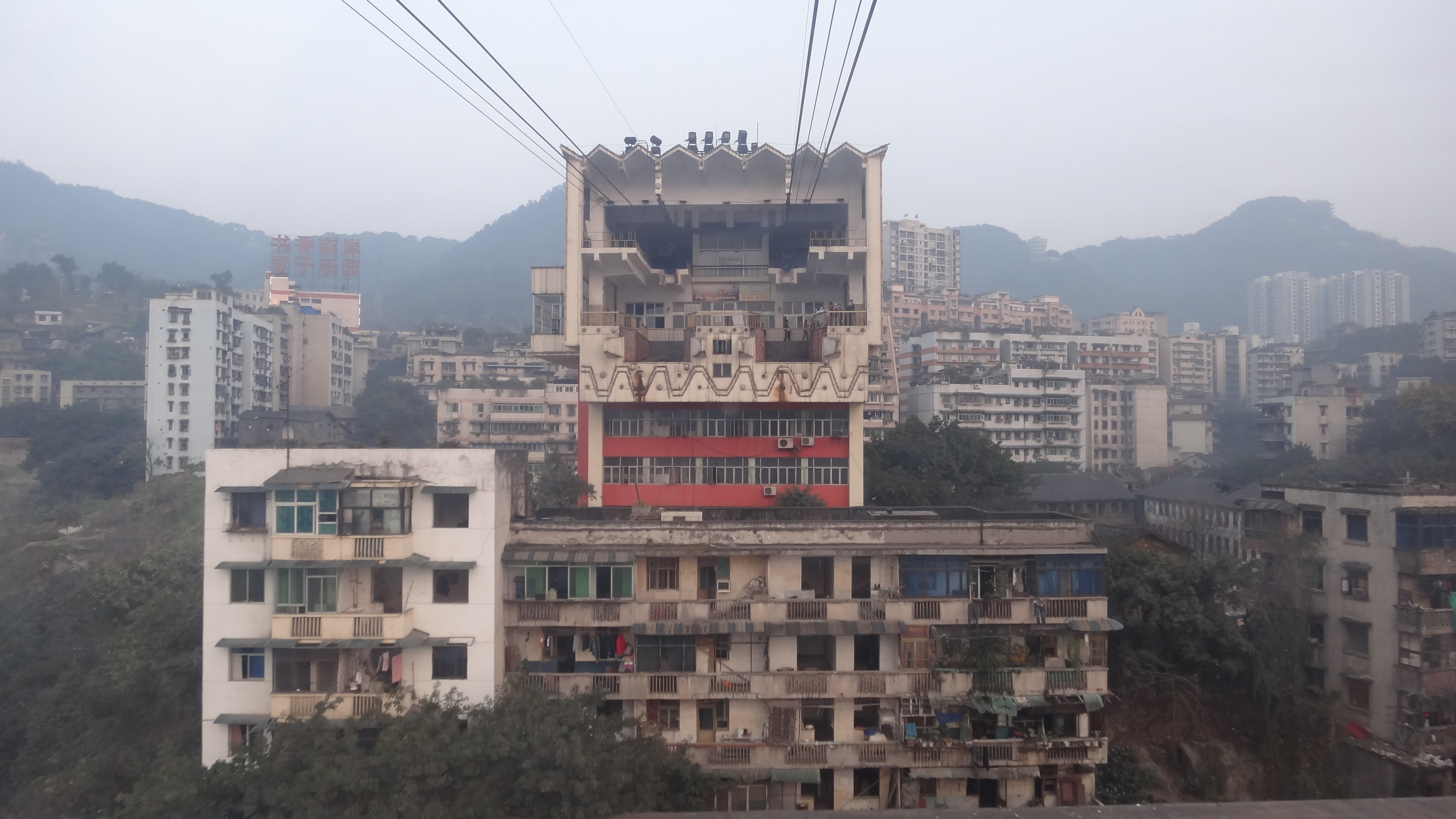 长江索道南端